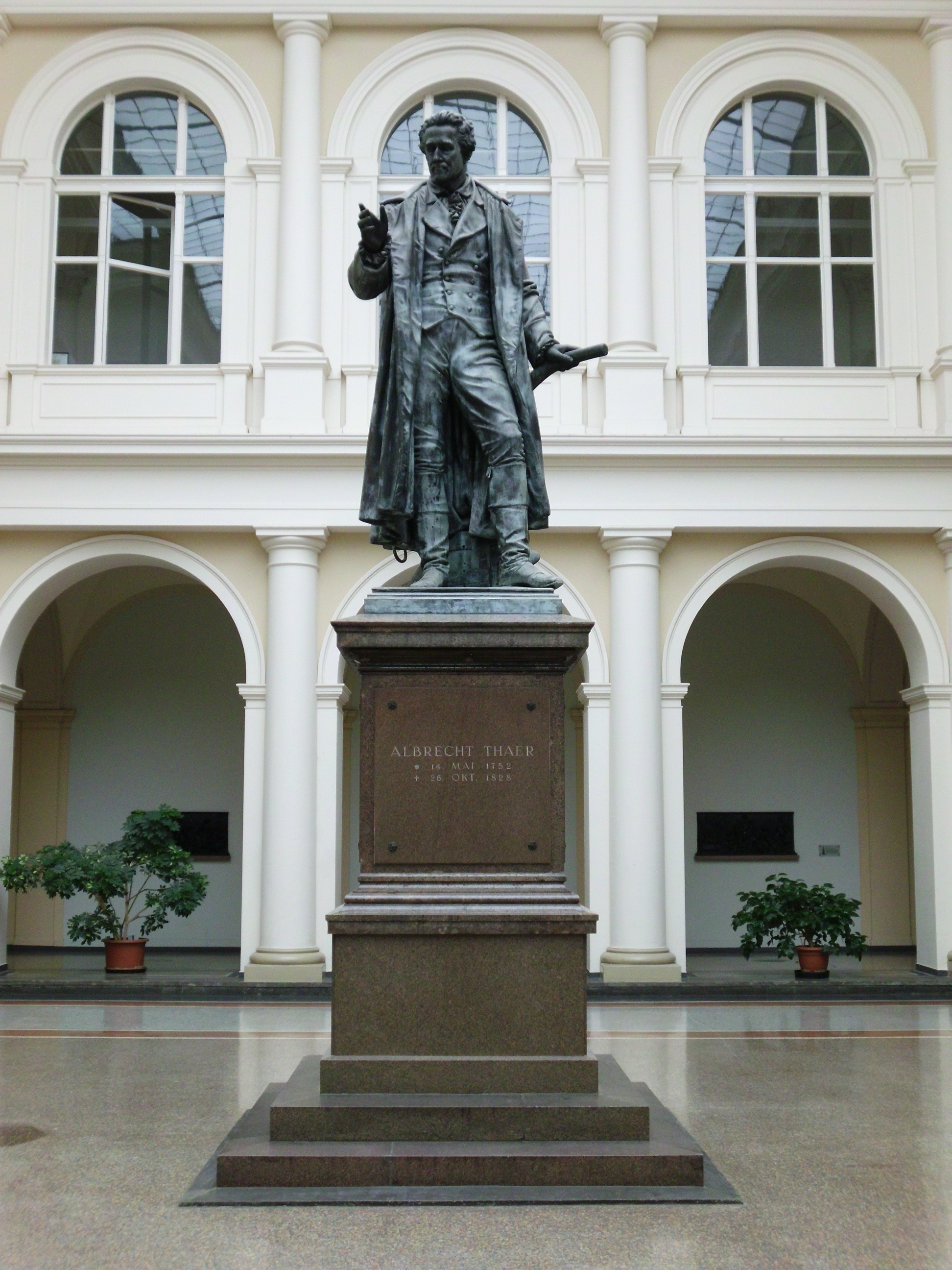 Das original Thaerdenkmal von Rauch in der Landwirtschaftlichen Fakultät in Berlin